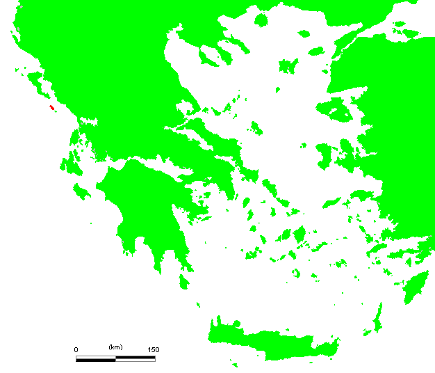 GR Paxi.PNG (Greek island)